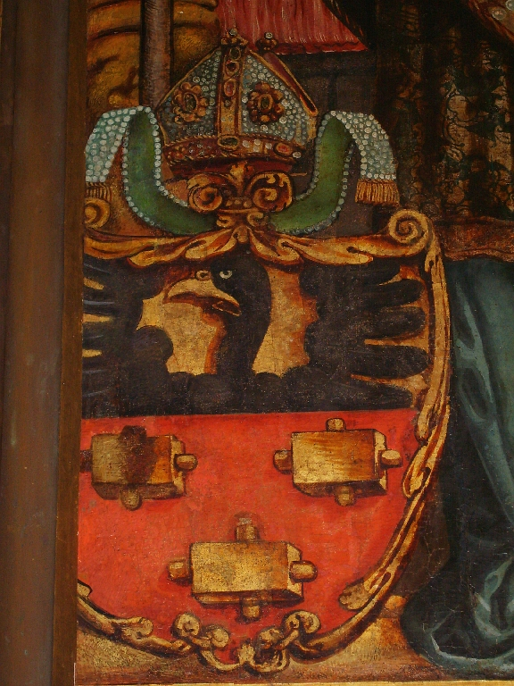 Herb Sulima biskupa krakowskiego Piotra Gamrata na portrecie w kościele OO. Franciszkanów w Krakowie